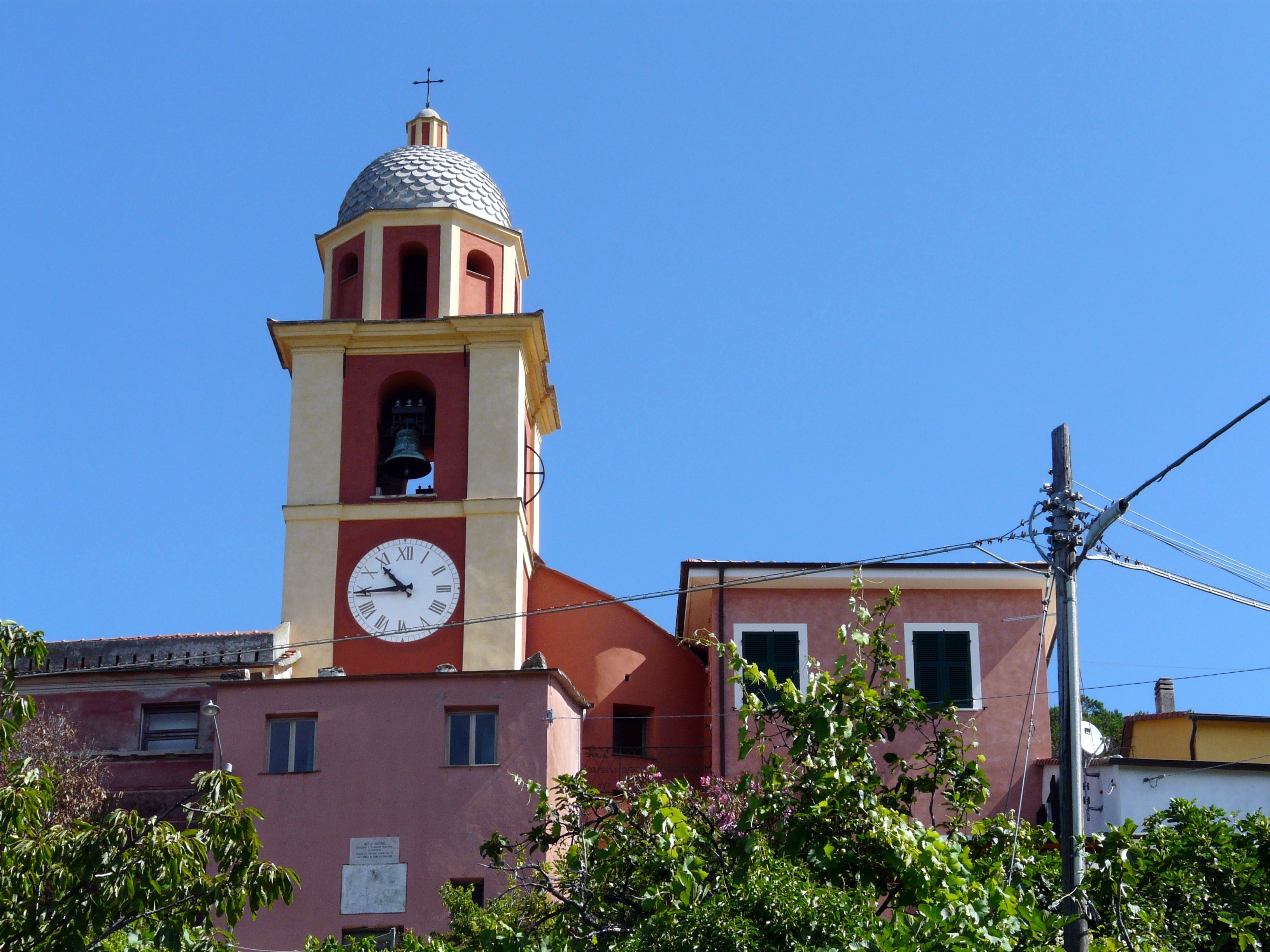 La chiesa di Santa Maria Assunta, Reggimonti, Bonassola, Liguria, Italia